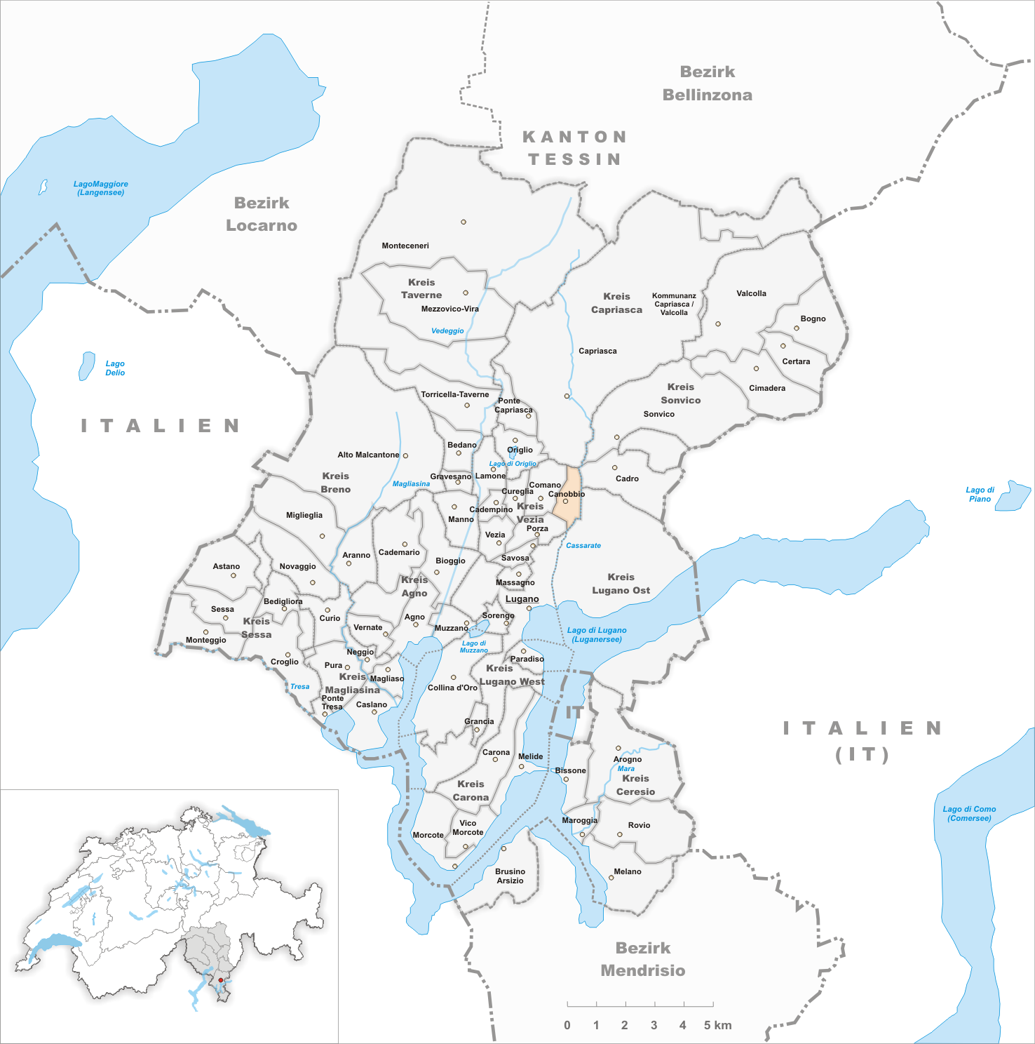 Municipality Canobbio